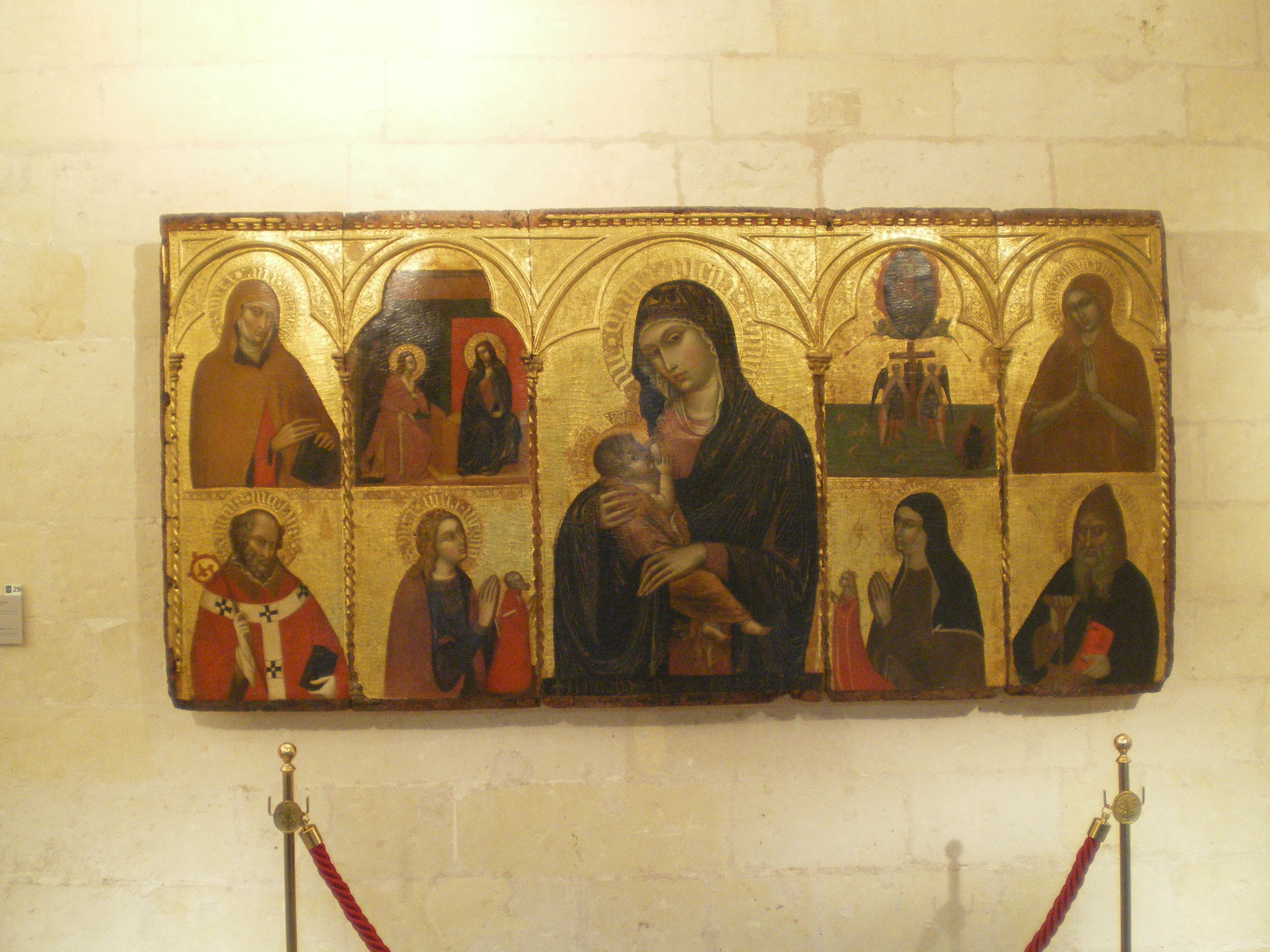 La obra representa a la Virgen de la Leche, y se supone que uno de los donantes que aparecen arrodillados en la parte inferior de la obra es el célebre magnate y escritor Don Juan Manuel (1282-1348), que fue nieto del rey Fernando III el Santo y adelantado mayor del reino de Murcia.